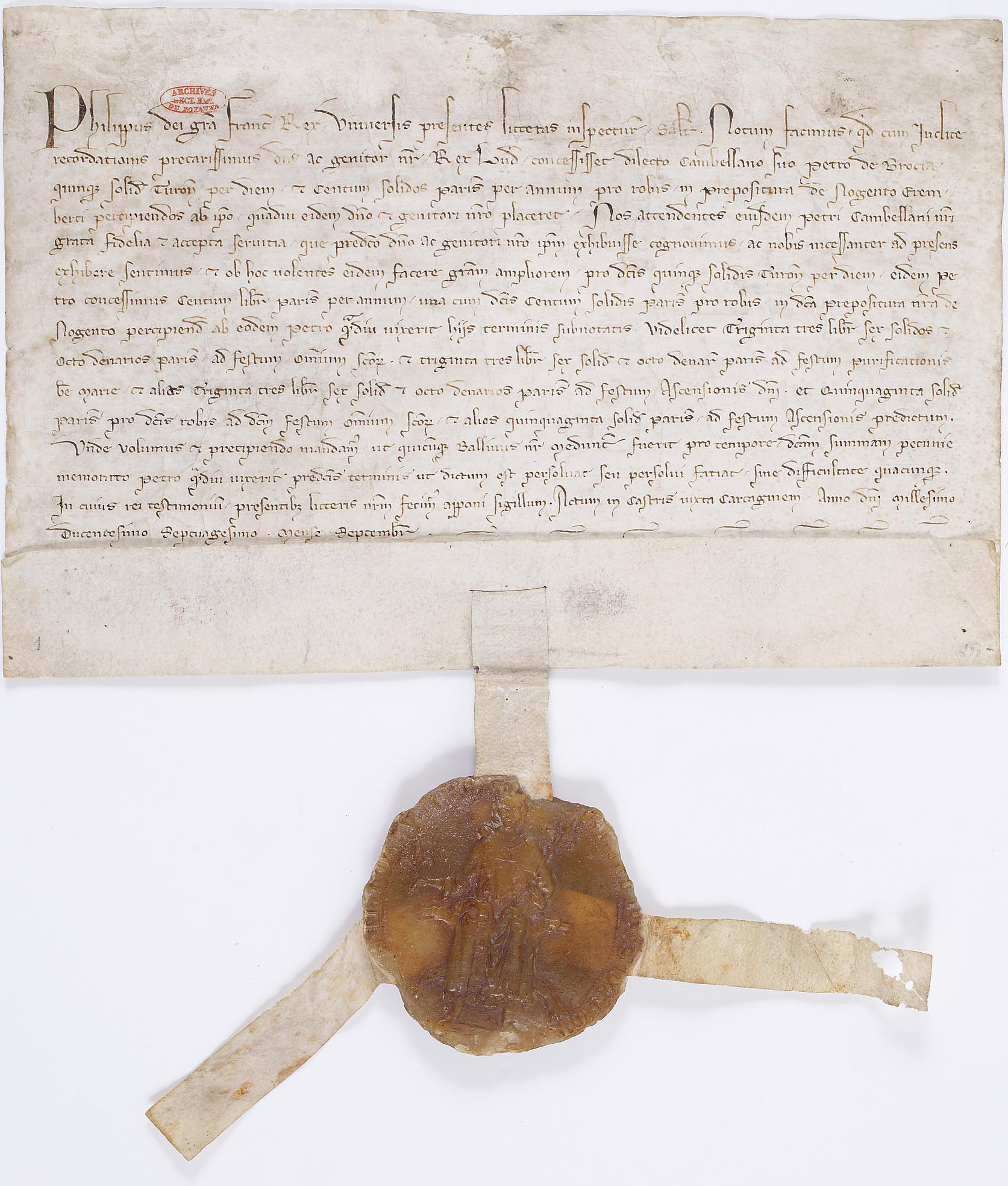 Le roi de France Philippe III le Hardi augmente un legs fait par son père en faveur de Pierre de La Brosse. Devant Carthage, septembre 1270.